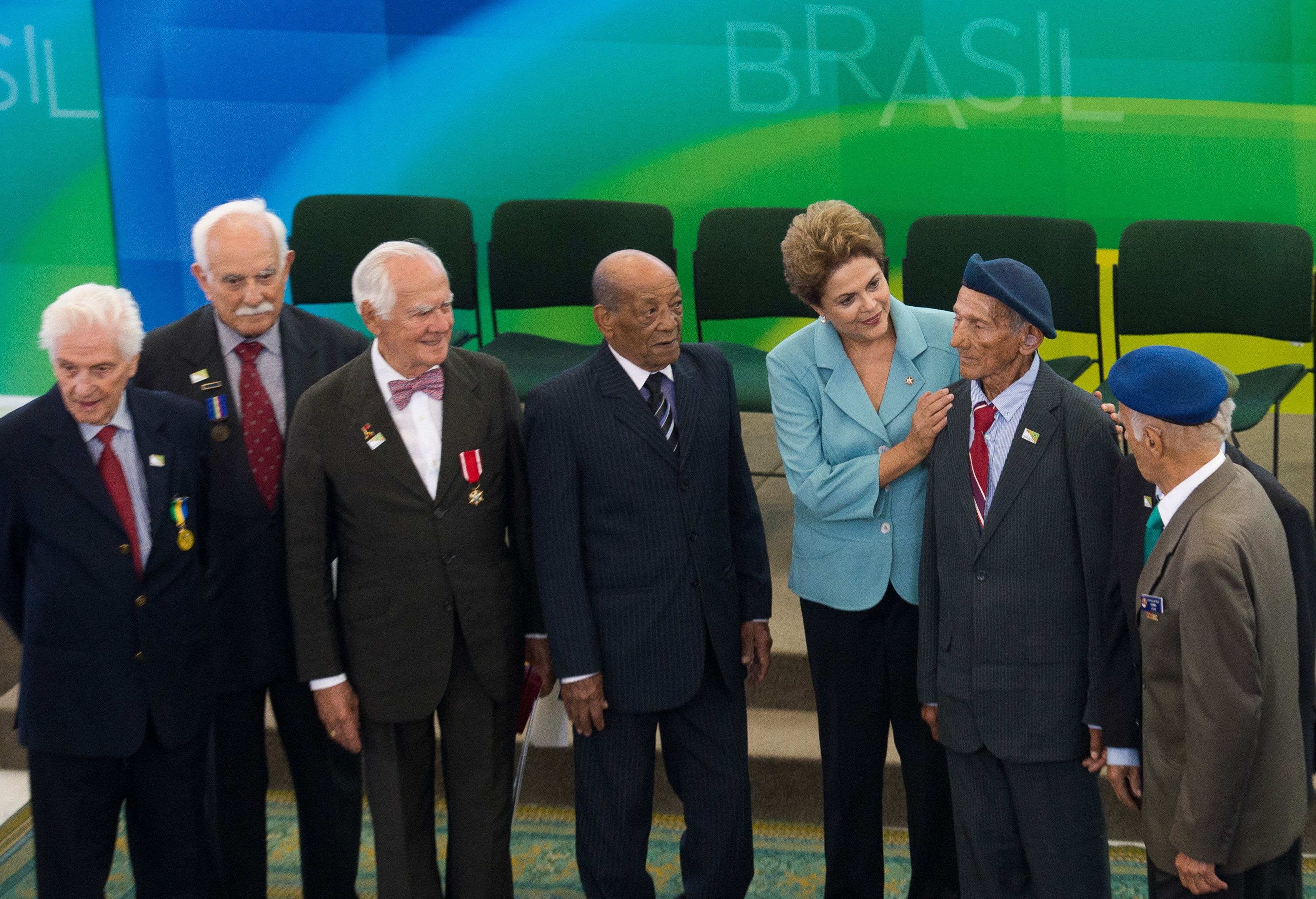 A presidente Dilma Rousseff participa da cerimônia de comemoração pelos 70 anos do Dia da Vitória, no Palácio do Planalto. A data, 8 de maio, marca o fim da 2ª Guerra Mundial.